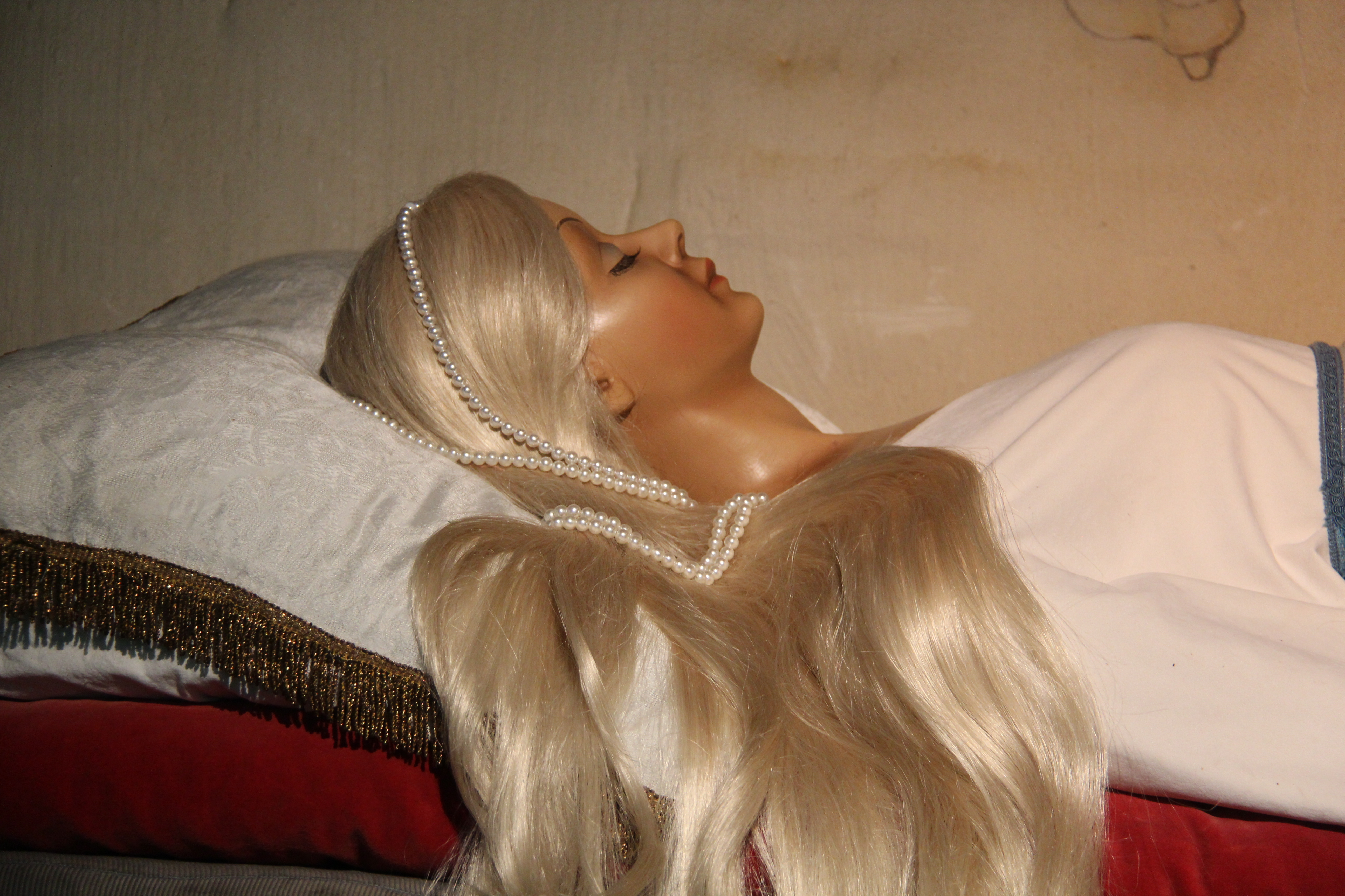 Doornroosje in de efteling